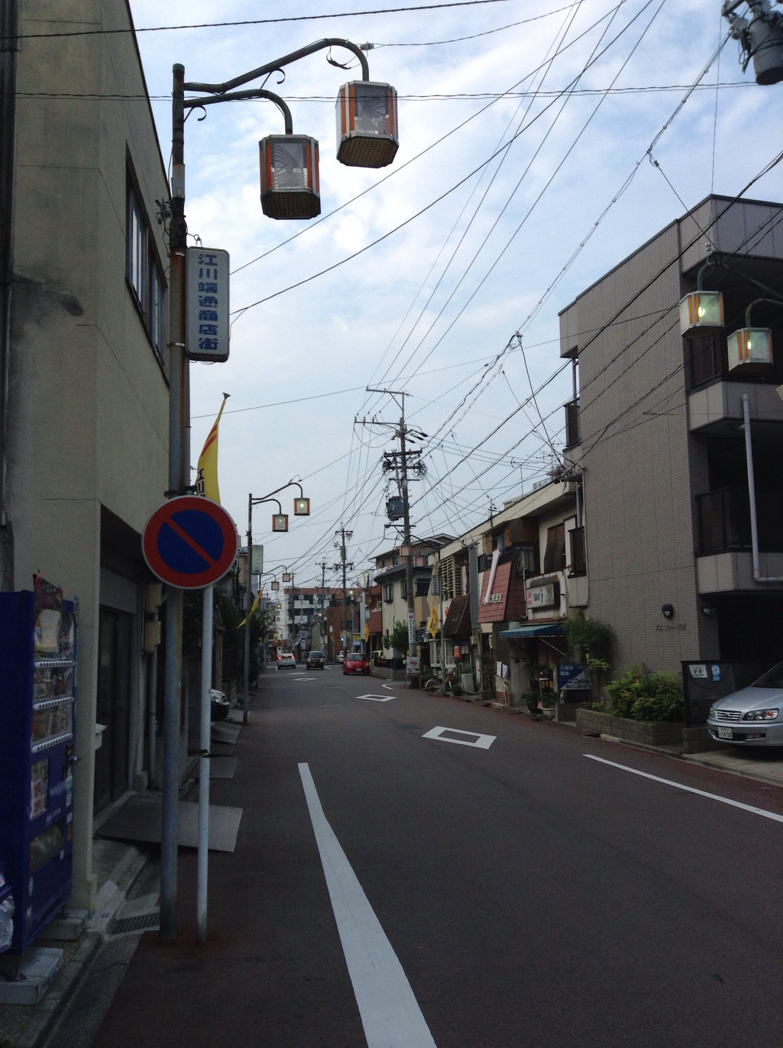 名古屋市西区にある江川端通商店街を南側から写す